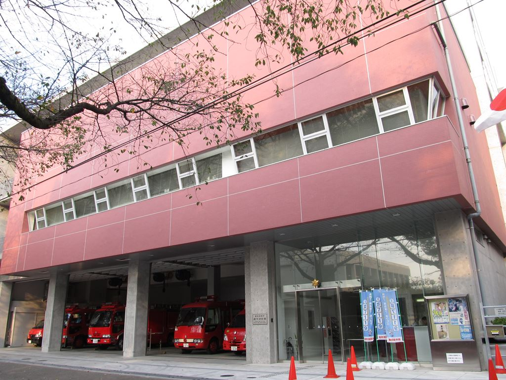 東京消防庁府中消防署本署